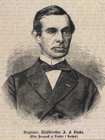 Den danske komponist og dirigent Andreas Frederik Lincke (1817-1874) Danish composer and conductor Andres Frederik Lincke (1817-1874)